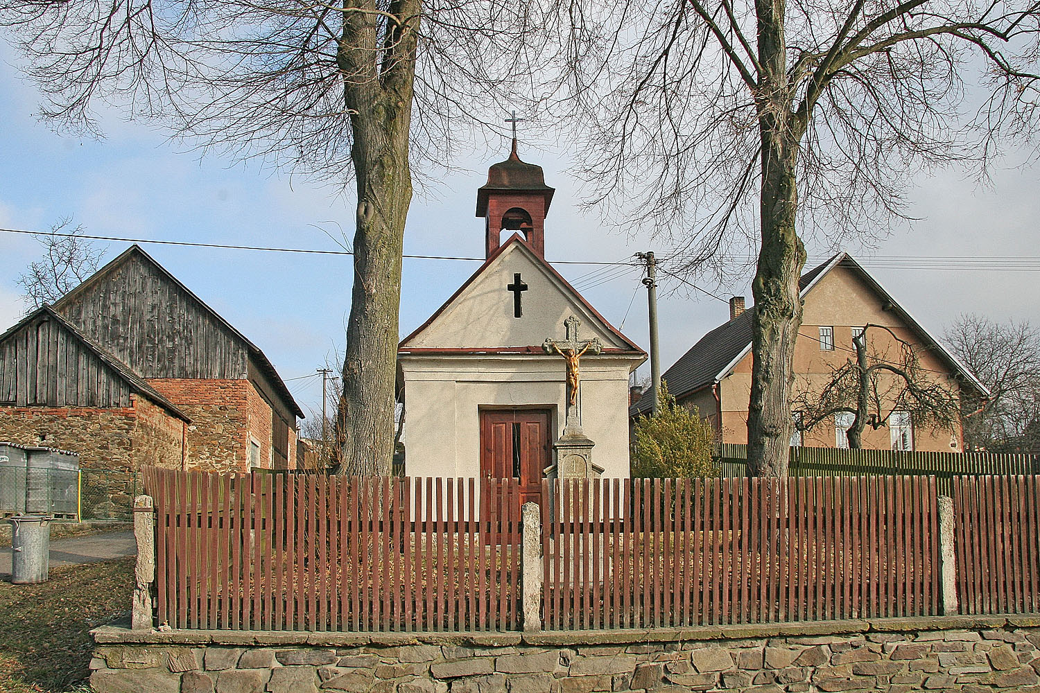 Česky: Kaple v obci Jedlá v okrese Havlíčkův Brod